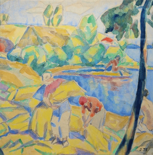 „Schnitter und badende Frauen am See“, großes Aquarell, monogrammiert, um 1921/23. Graphisches Werkverzeichnis Nr. 357. Das expressionistische Aquarell dokumentiert die hervorragende Akademieausbildung von Josef Steiner bei Professor Karl Hofer, dessen Meisterschüler er wurde. Dieses Werk beinhaltet auch das unmittelbare künstlerische Umfeld des Berliner Expressionismus und es zeugt ebenso von dem unverkennbaren Einfluss Max Pechsteins, mit dem Gertrud und Josef Steiner eine jahrelange Freundschaft pflegten. Das typisch mit „J. St.“ monogrammierte Werk ist außerdem rückseitig mit der bekannten Sütterlin-Signatur des Künstlers versehen sowie seiner frühen Berliner Adresse „Berlin-Schöneberg, Eisenacherstr. 64“. Auch aufgrund dieser Annotation lässt sich die Entstehungszeit festlegen. Dieses meisterlich expressive Aquarell, welches einem Gemälde gleichkommt, stellt das bedeutendste Werk des graphischen Nachlasses von Josef Steiner dar.